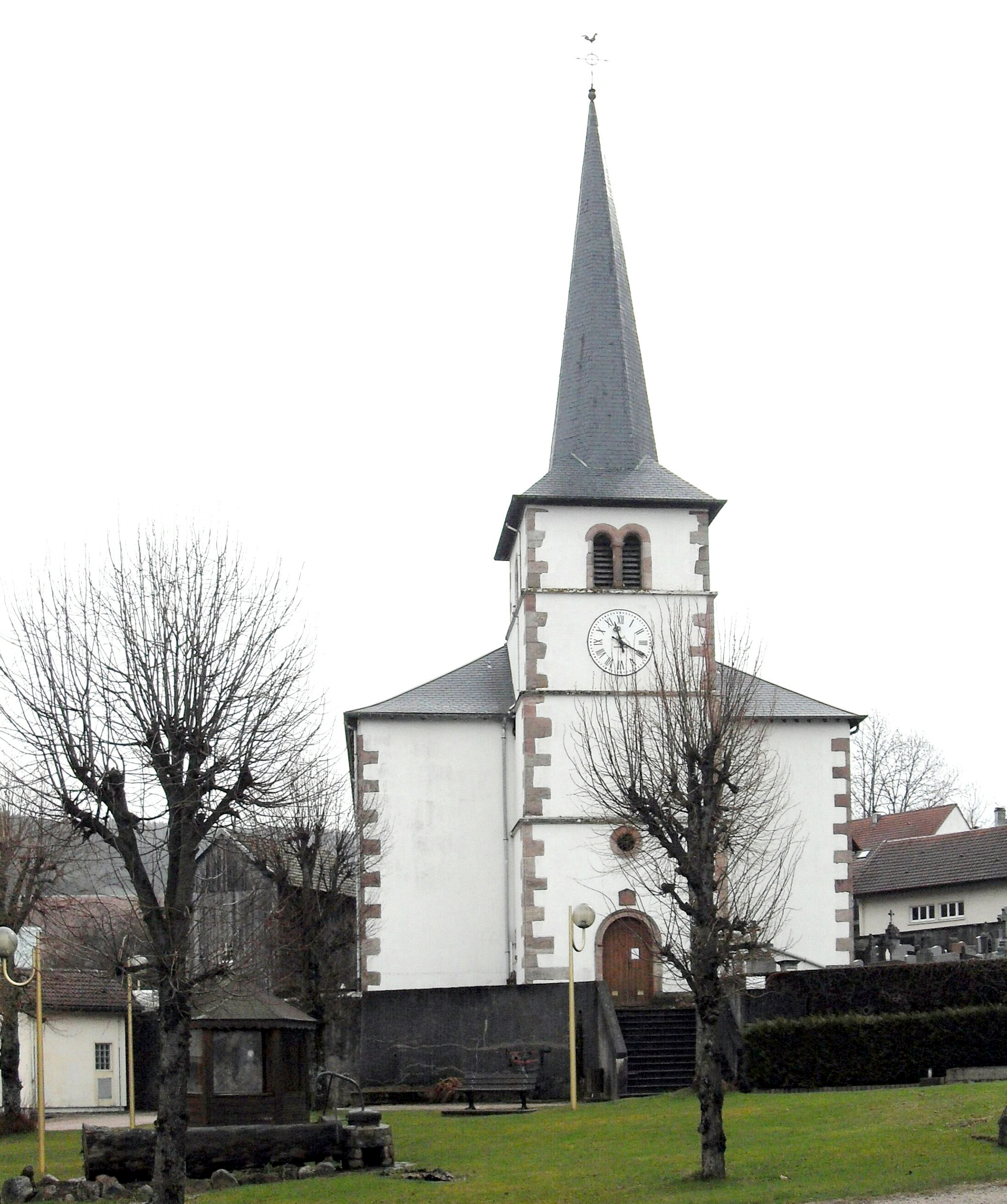 L'église Saint-Jean-Baptiste à Gerbépal